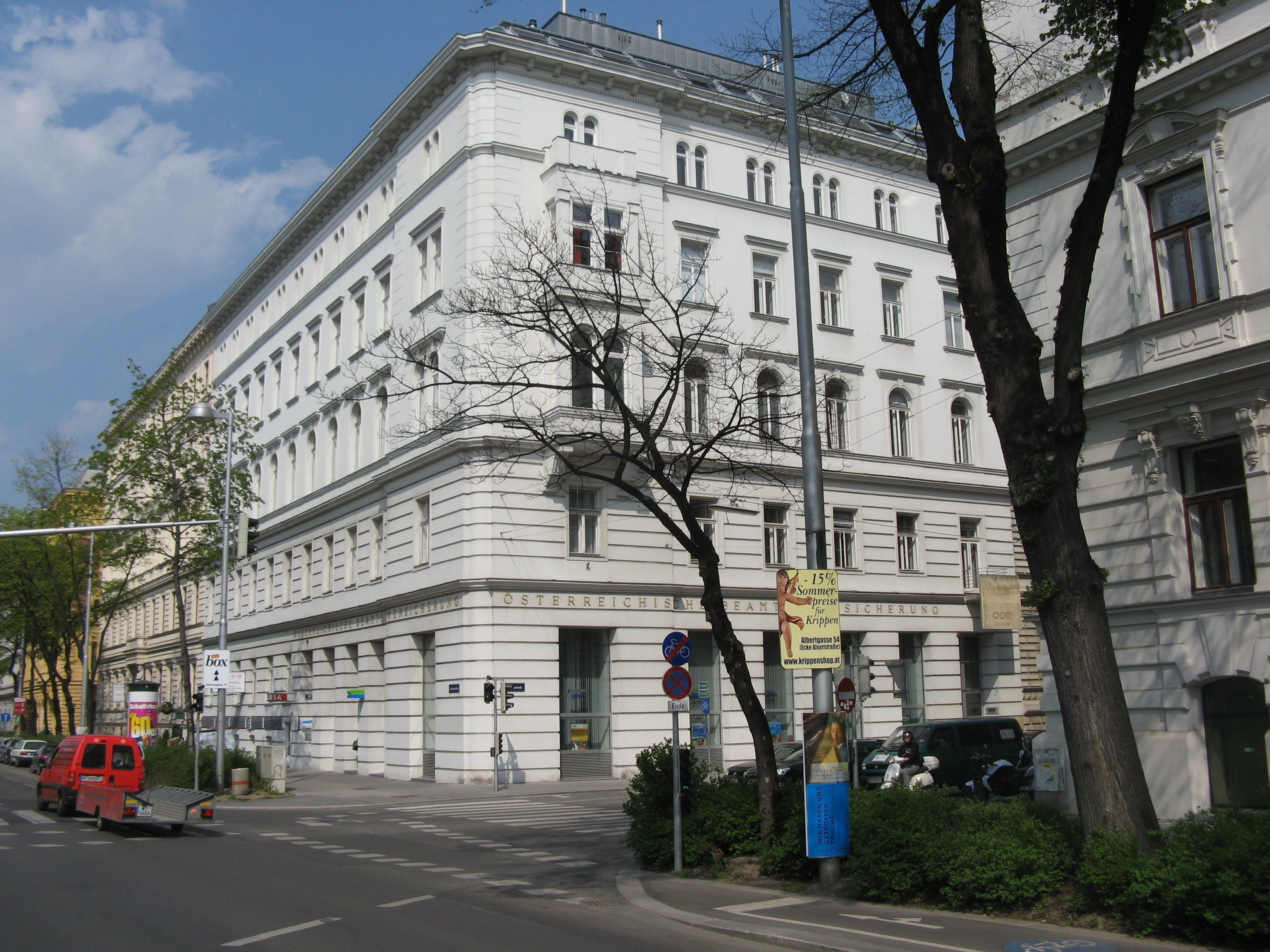 Haus (1881) von Wilhelm Stiassny, Grillparzerstraße 14, Wien-Innere Stadt